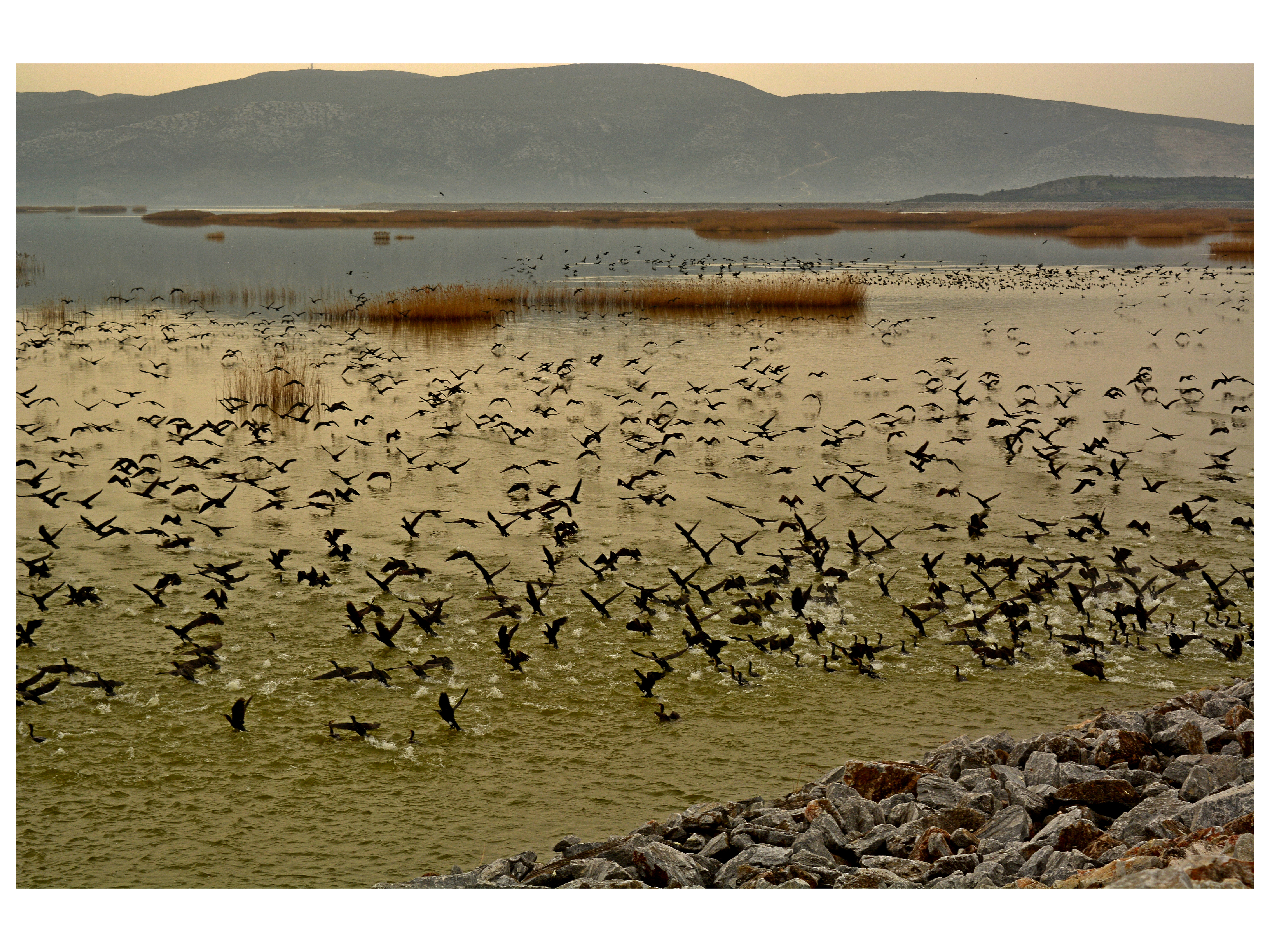 ΠΟΥΛΙΑ ΜΕ ΚΙΝΗΣΗ, ΕΠΙΡΡΟΗ ΣΤΟ ΧΡΩΜΑ ΣΤΗΣ ΛΙΜΝΗΣ This is a photography of Natura 2000 protected area with ID GR1420004